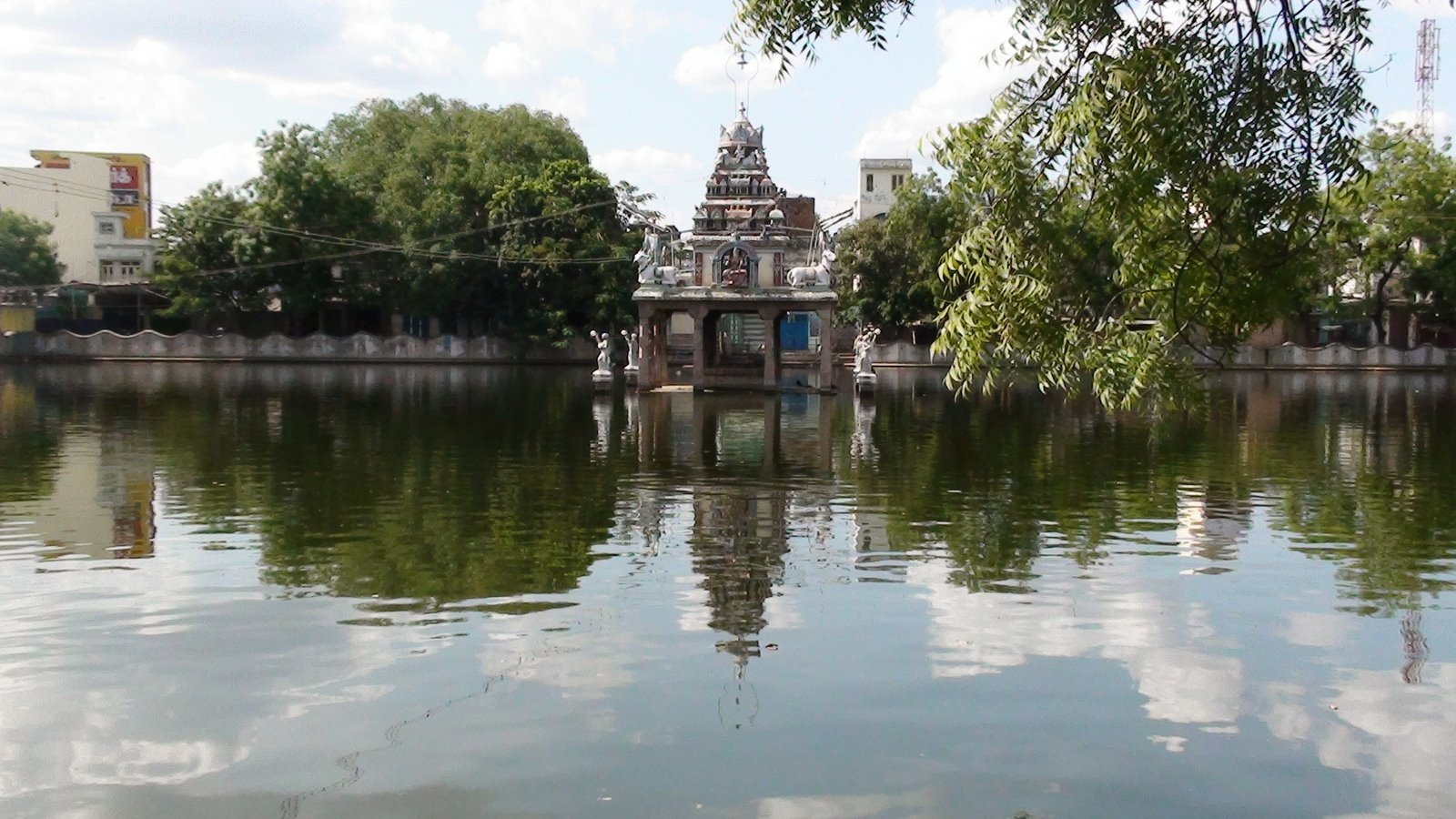 விருதுநகரின் பெருமைக்குச் சான்றாக விளங்கும் தெப்பக்குளம். இந்தக் குளத்தின் நடுவில் இருக்கும் கோயில் மண்டபத்தின்மீது இருந்துதான் காந்தியடிகள் உரையாற்றினார் என்று கூறவார்கள். அந்தத் தெப்பக்குளத்தின் அழகிய காட்சி.